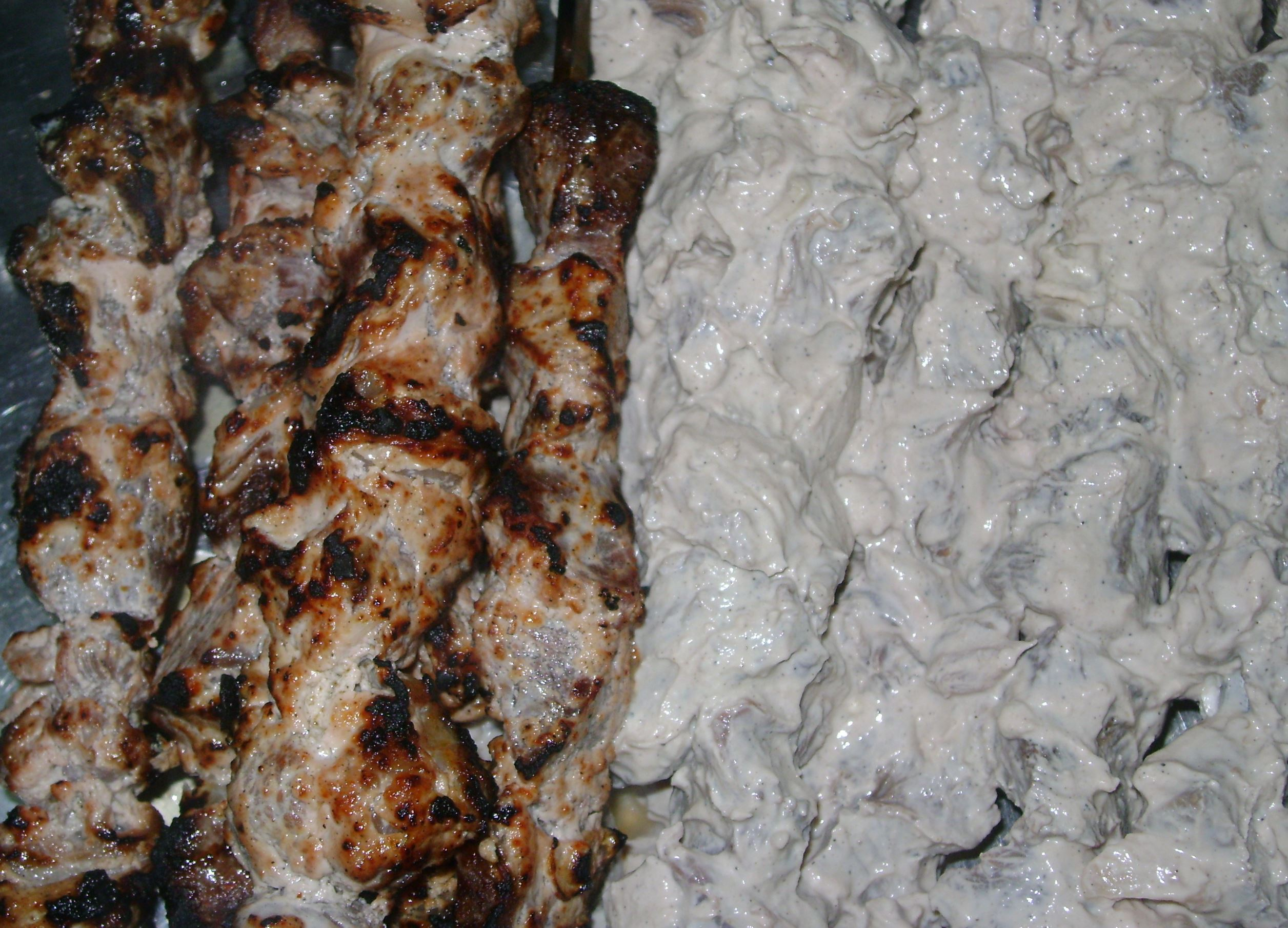 کباب خاص گراشی - سمت چپ: پخته - سمت راست: نپخته